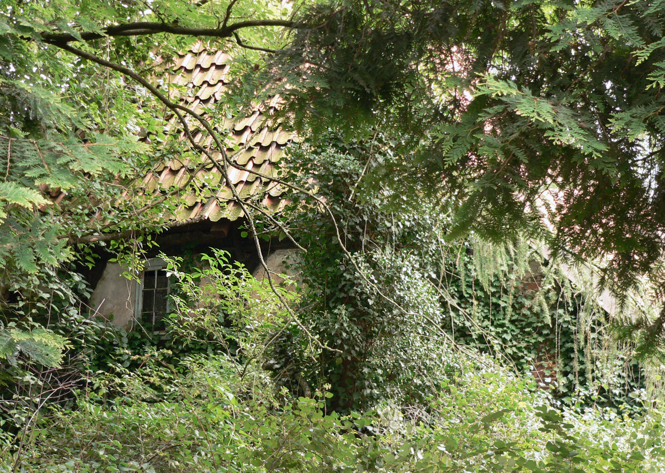 Köritzhof, rückwärtiger Giebel des Hallenhauses